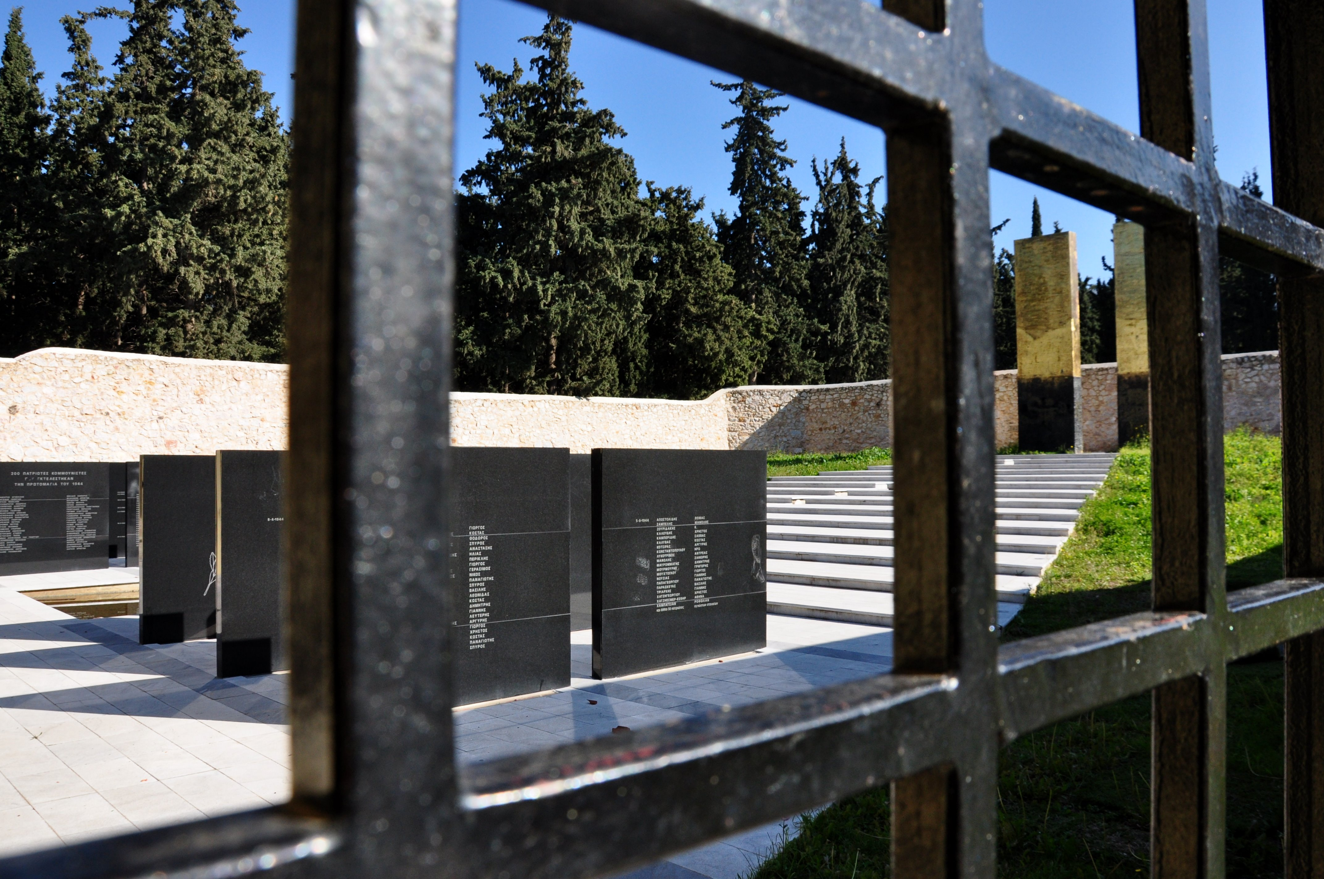 Kesariani, Ateny, Grecja. Teren byłej strzelnicy wojskowej (jedna z kilku, sąsiadujących ze sobą), miejsce straceń greckich patriotów, w trakcie II wojny światowej. Prawdopodobnie to tu rozstrzelano m.in. Jurka Szajnowicza-Iwanowa, wybitnego sportowca, greckiego i polskiego, następnie organizatora ruchu oporu w Grecji, bohatera obu narodów. Niestety, widoczne na fotografii starannie wykonane tablice, dotyczą znacznie późniejszej egzekucji i jedynie jednej z grup patriotów, tu poległych